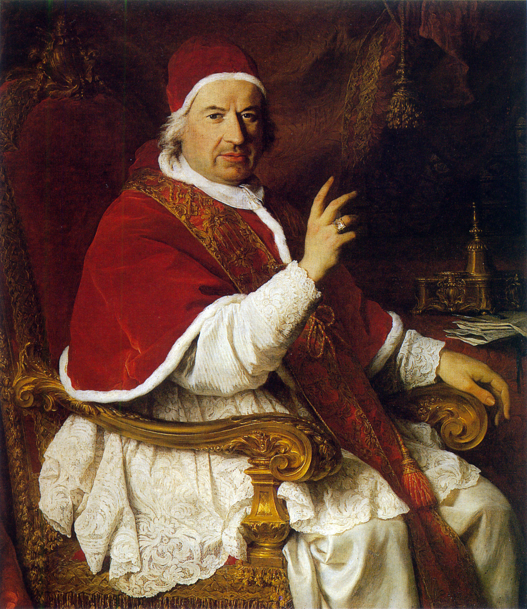 copie d'après un original peint à Rome en 1741 ; autre version conservée au musée Condé à Chantilly